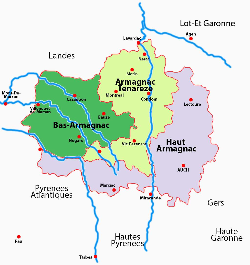 Bas-Armagnac maps